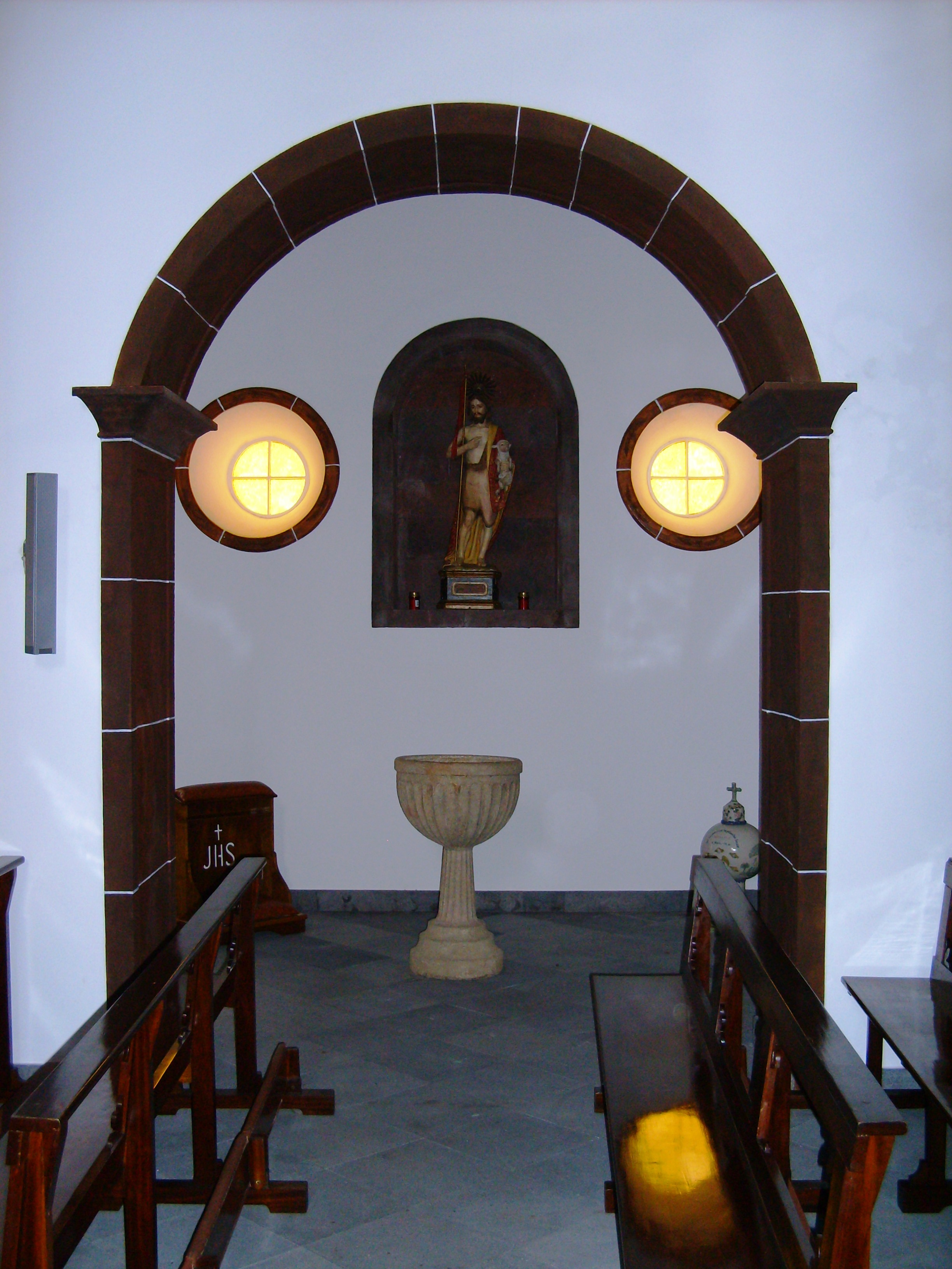 Igreja de Nossa Senhora do Bom Despacho (Almagreira), Ilha de Santa Maria (Açores), Portugal.